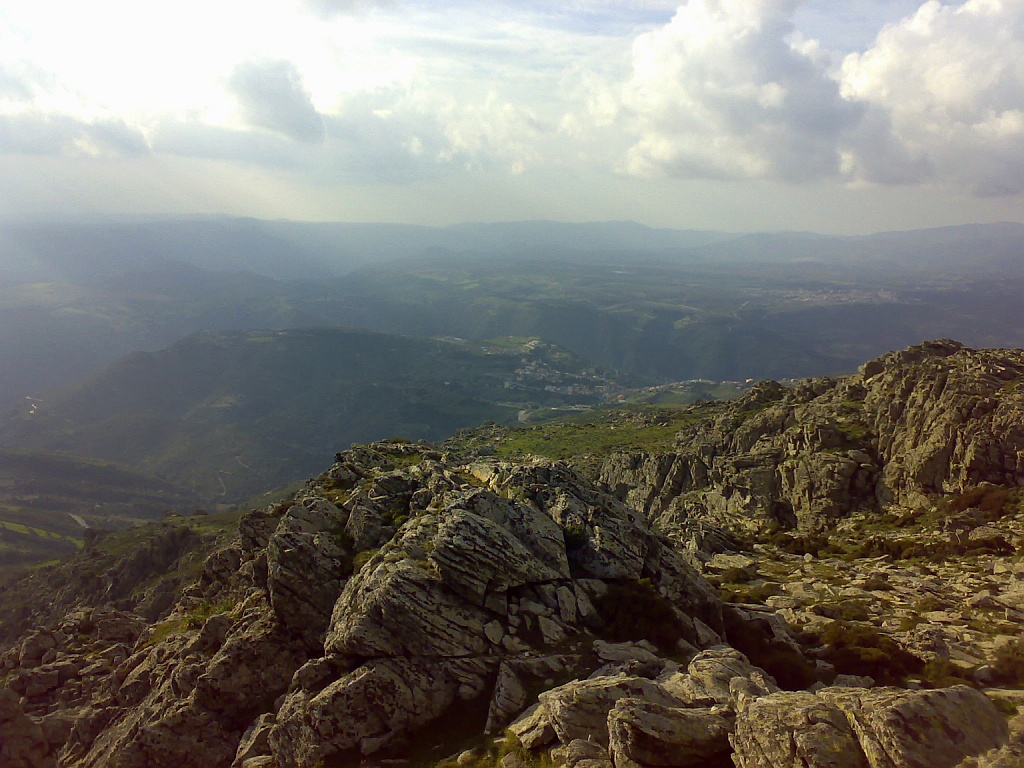 Panorama dal Monte S. Vittoria, Esterzili (lato Nord-Ovest)